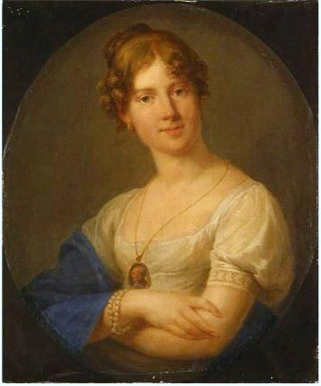 Каролина Мария Хрептович, урож. фон Рённе (1780-1846), жена графа И. М. Хрептовича (1775-1850).